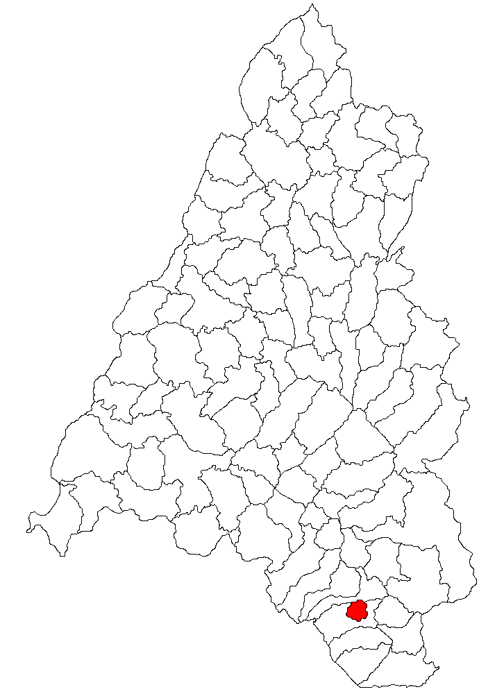 Categorie:Hărţi ale judeţului Bihor